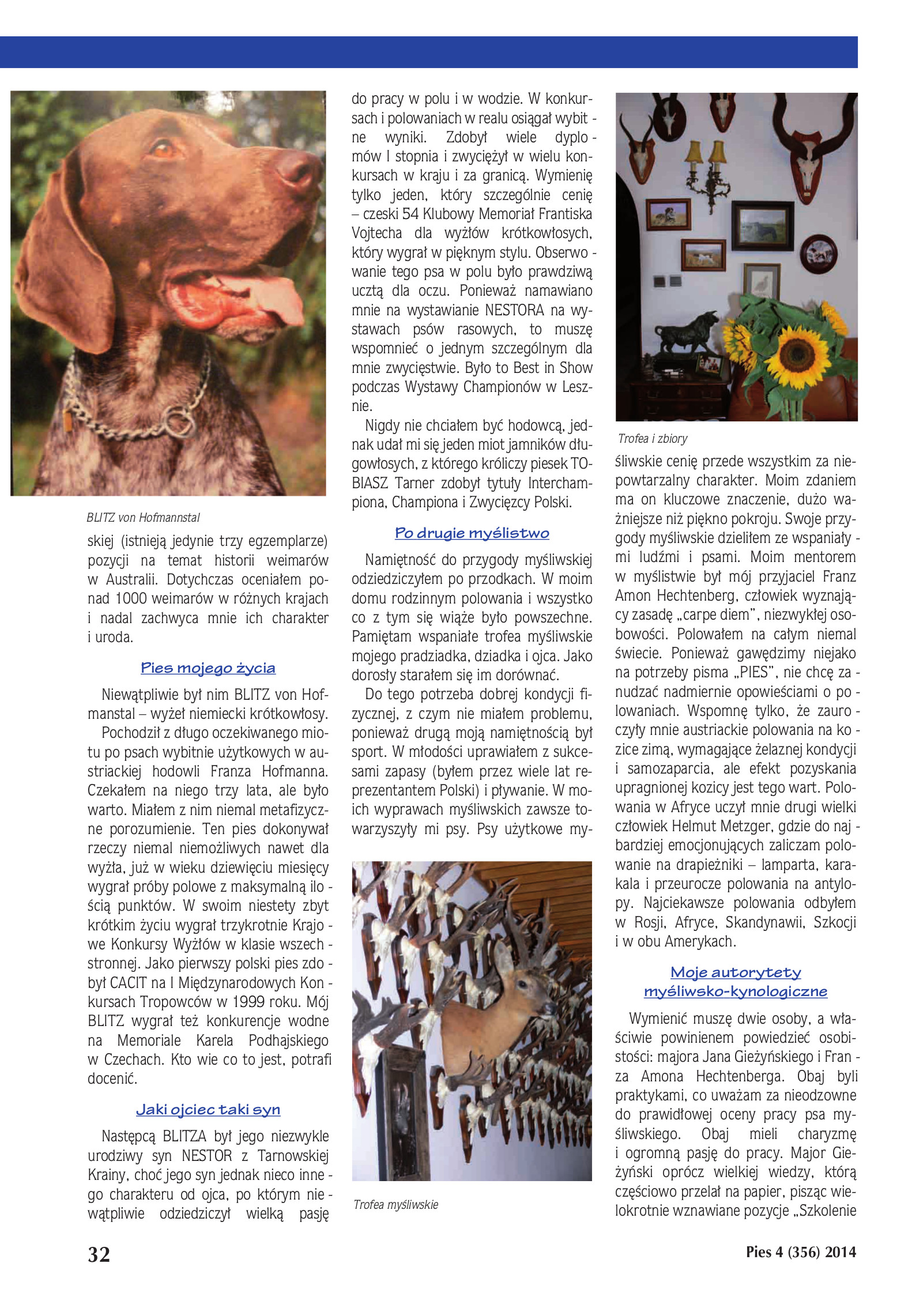 "Tradycja i zamiłowanie", PIES, 4 (356) 2014, strona 3/4.